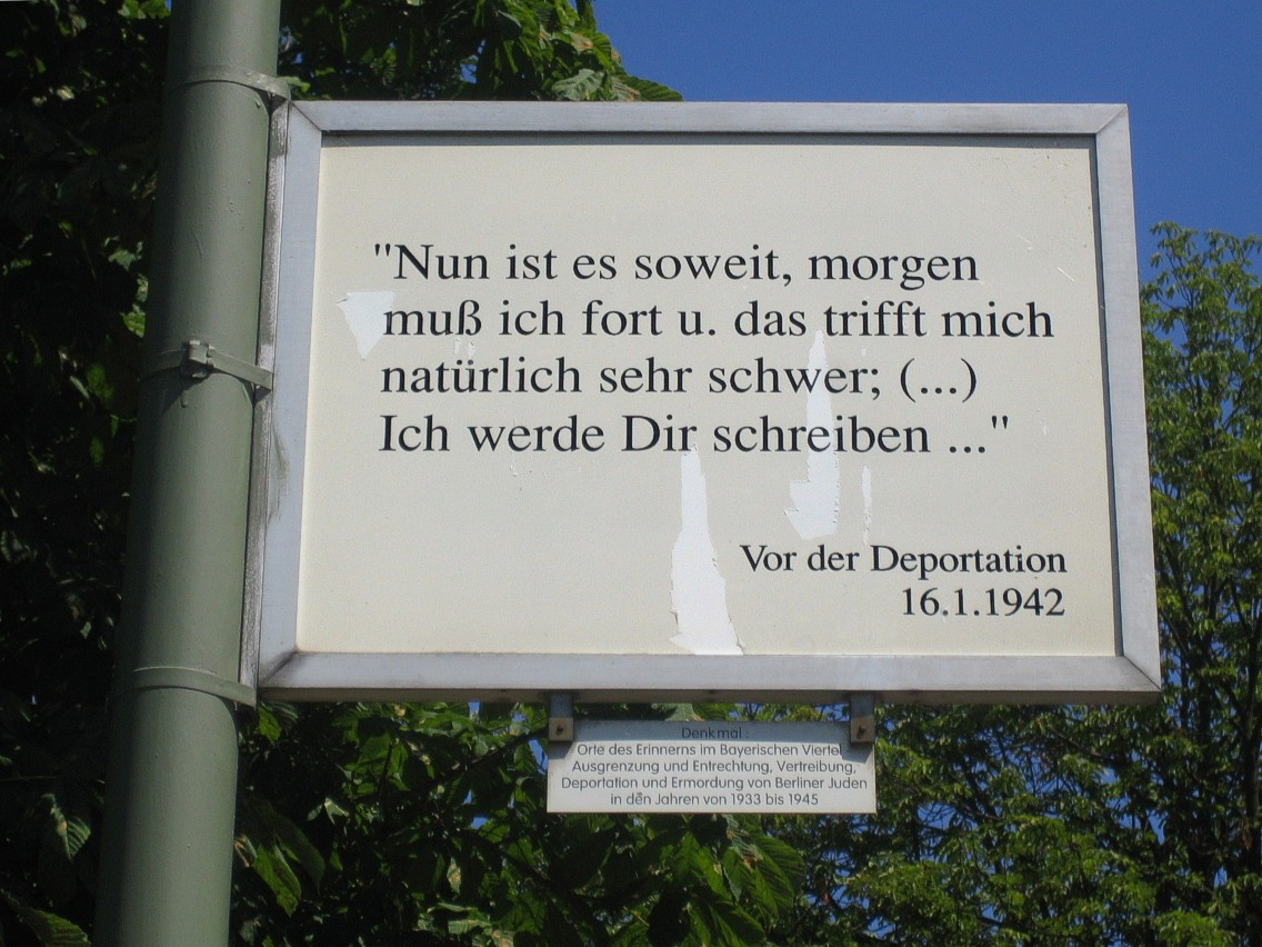 Berlin-Schöneberg, Bayerisches Viertel. Denkmal zur Erinnerung an die Unterdrückung der Juden 1933-1945. Tafel mit Abschiedsbrief. Textseite.